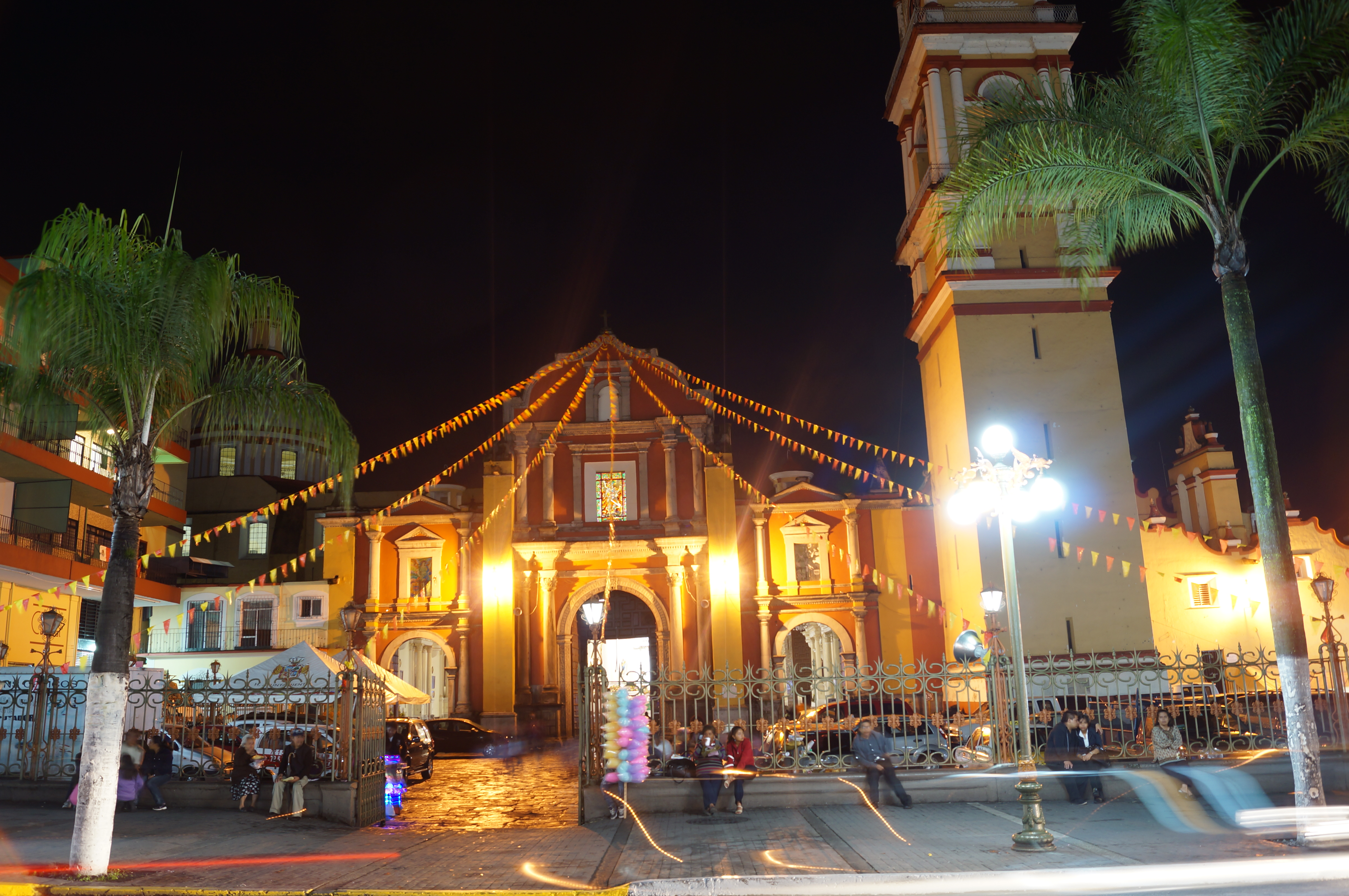 Domingo de misa exelente toma